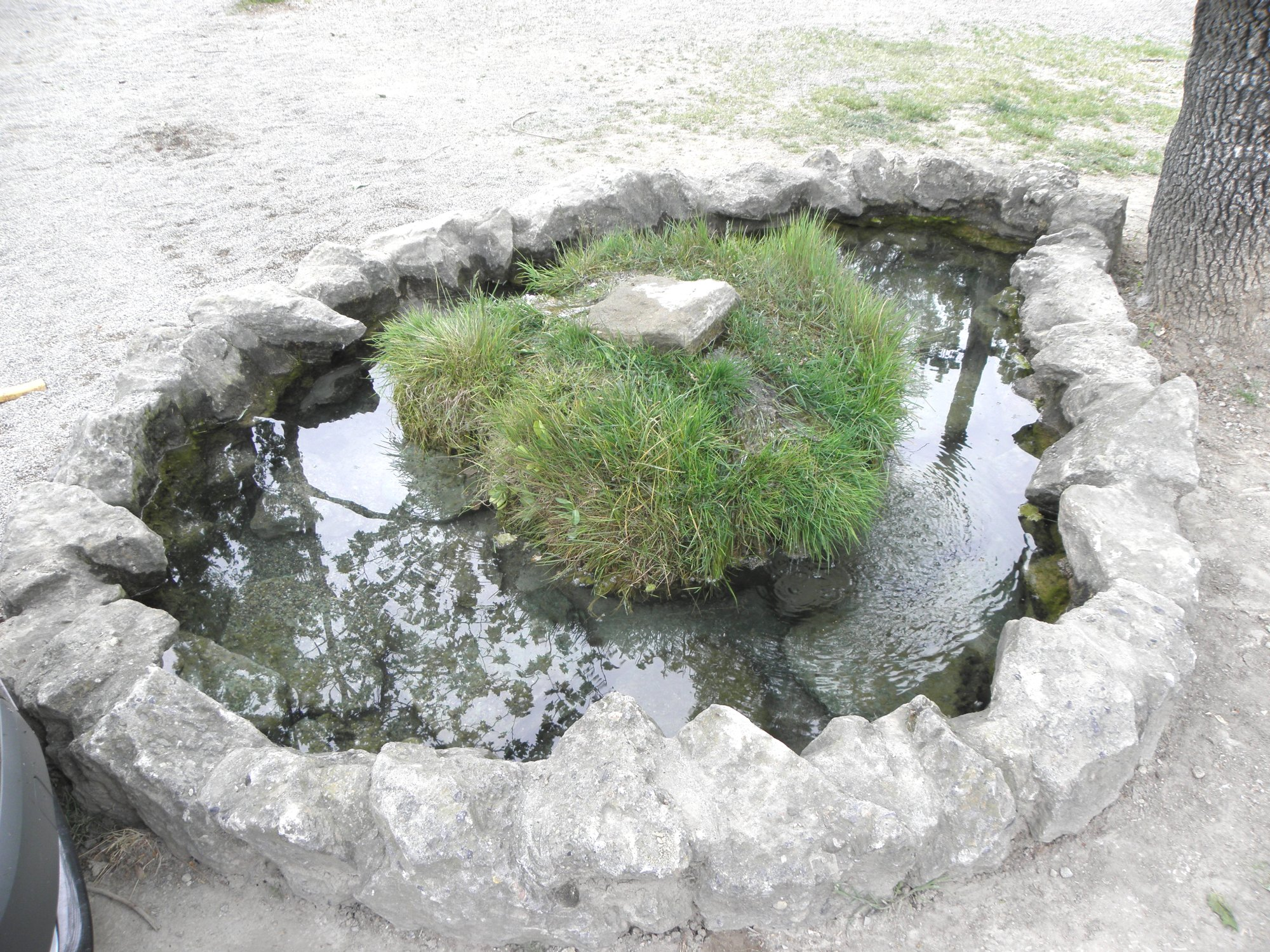 La font de sortidos canalaitzada de la Mare de la Font, al municipi de Solsona (Solsonès)